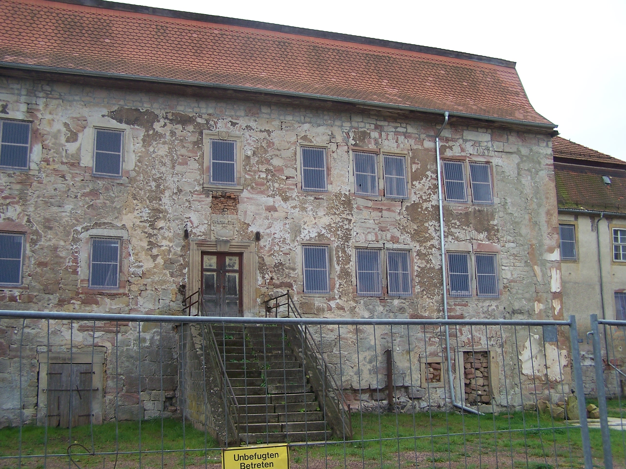 Barchfeld